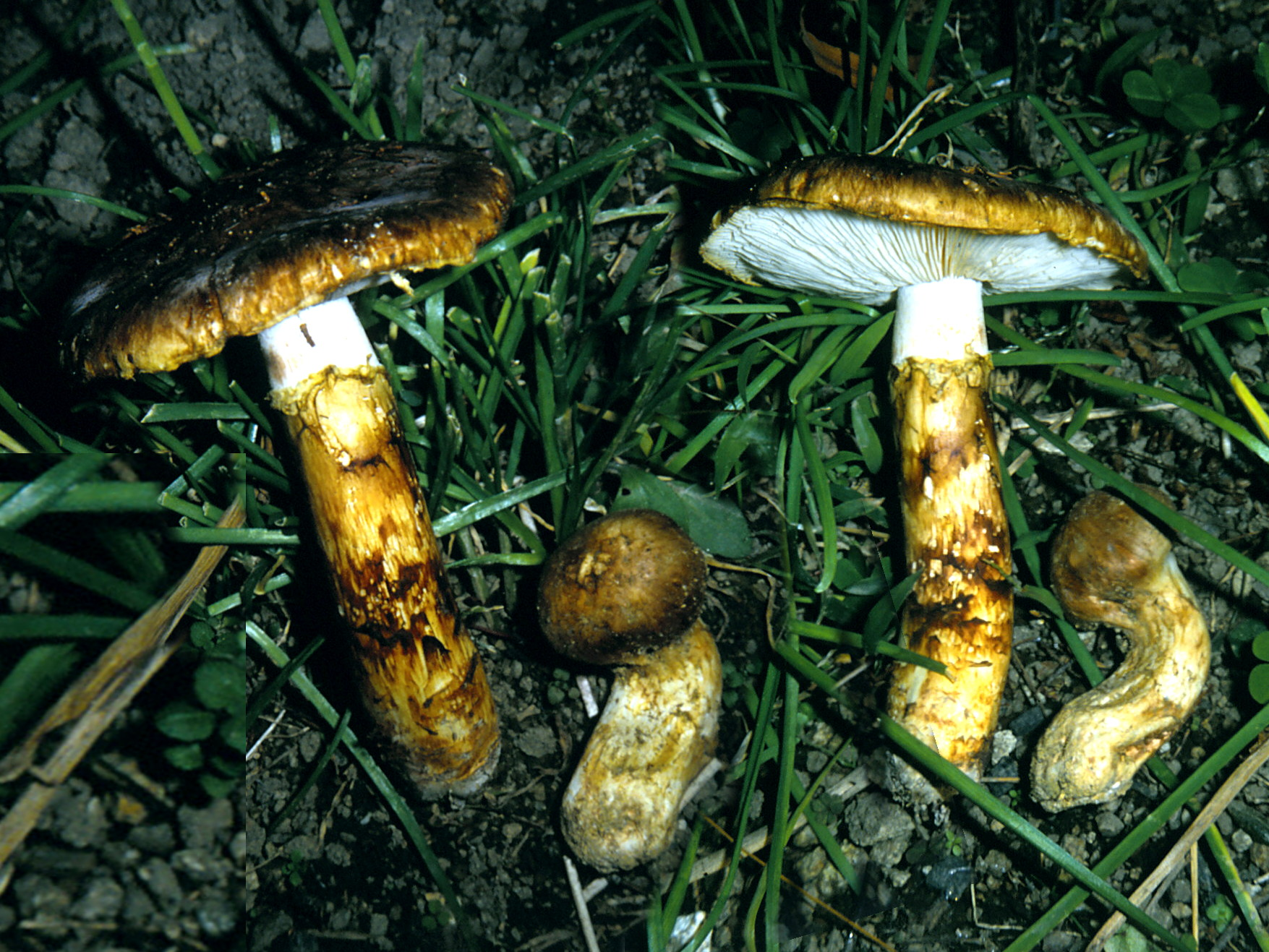 Matsutaké du Japon. Récolté sous Pins Rouges (Hiroshima Pref.) Mihara. Parfum typique agréable. Chair douce.